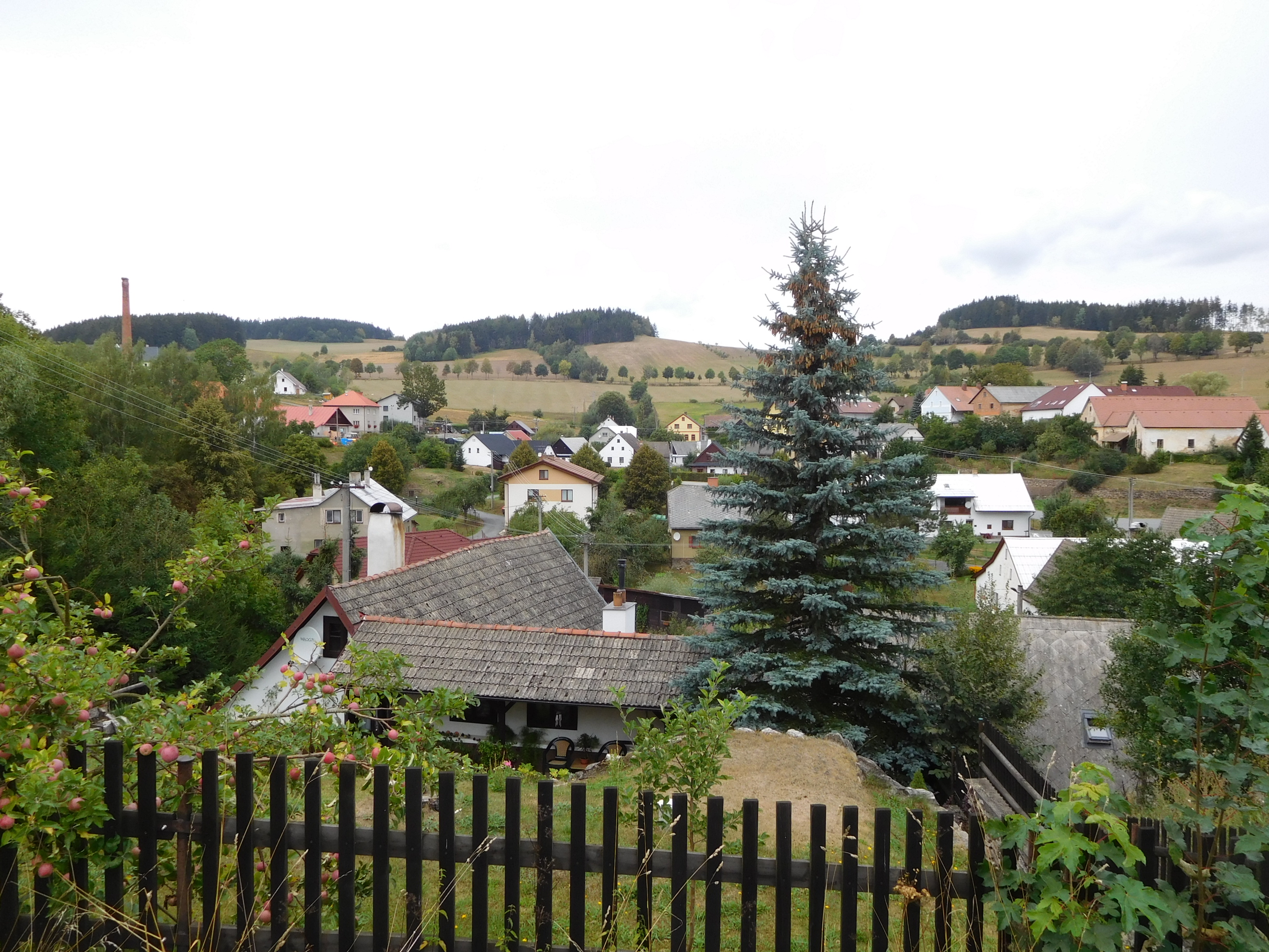 Jimramovské Pavlovice - celkový pohled od jihojihovýchodu